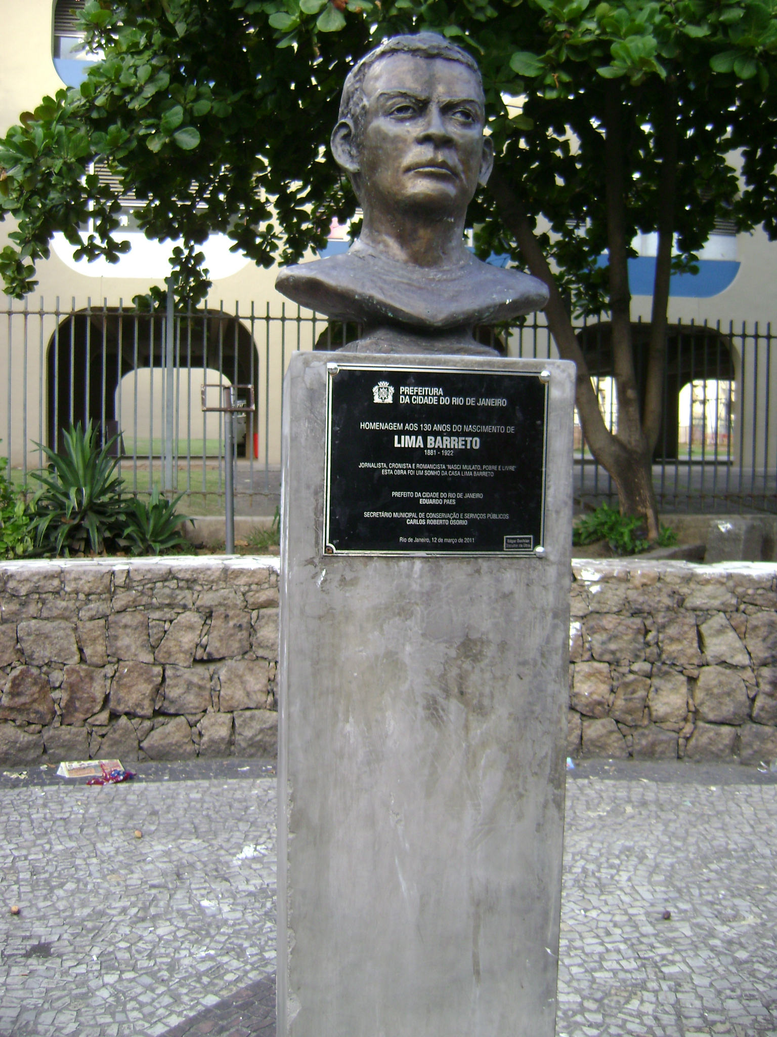 Estátua de Lima Barreto no Rio de Janeiro, Brasil.